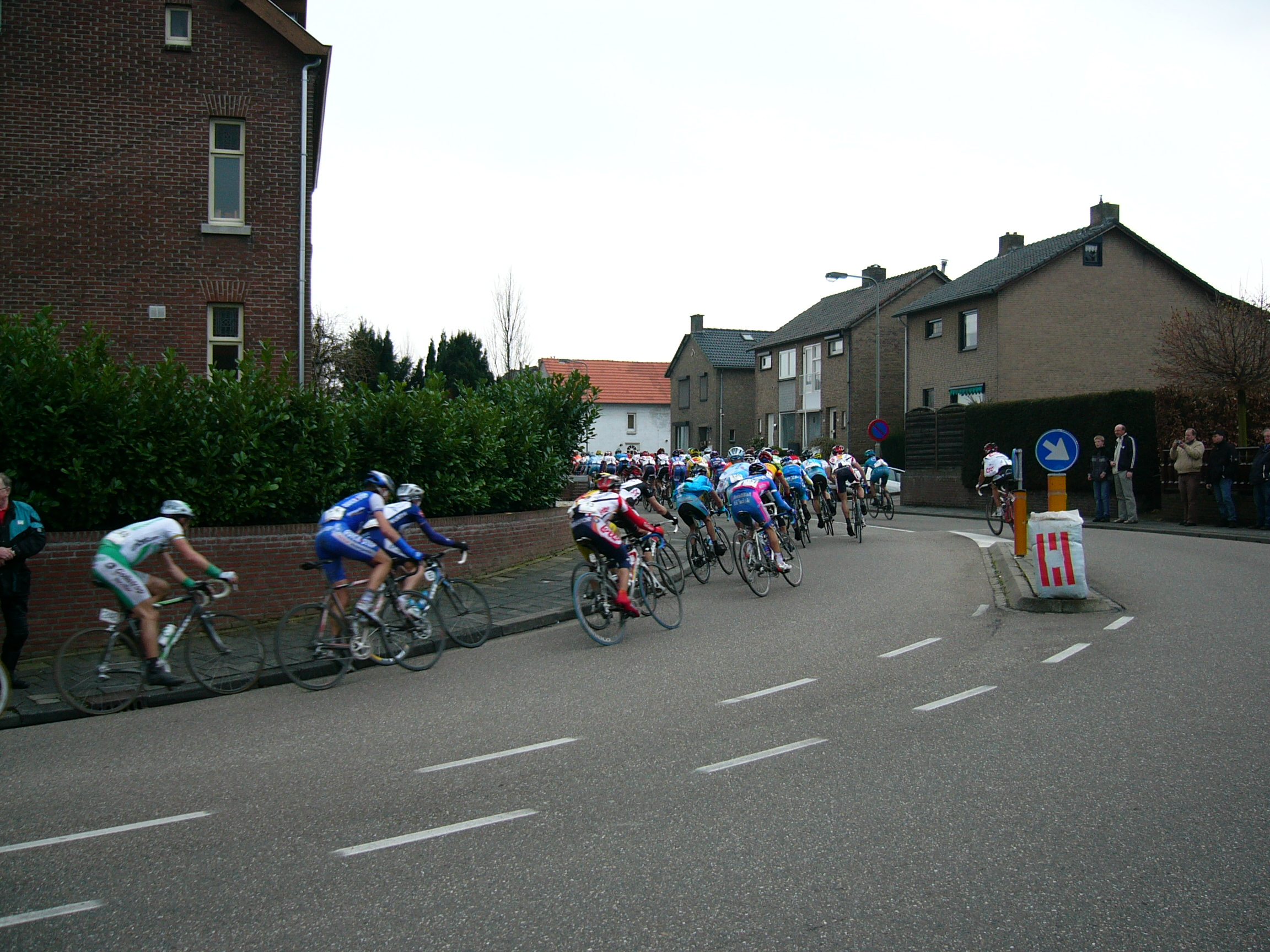 Amstel Gold Race 2006 in Berg (Valkenburg aan de Geul). Foto door Cicero, 16 april 2006